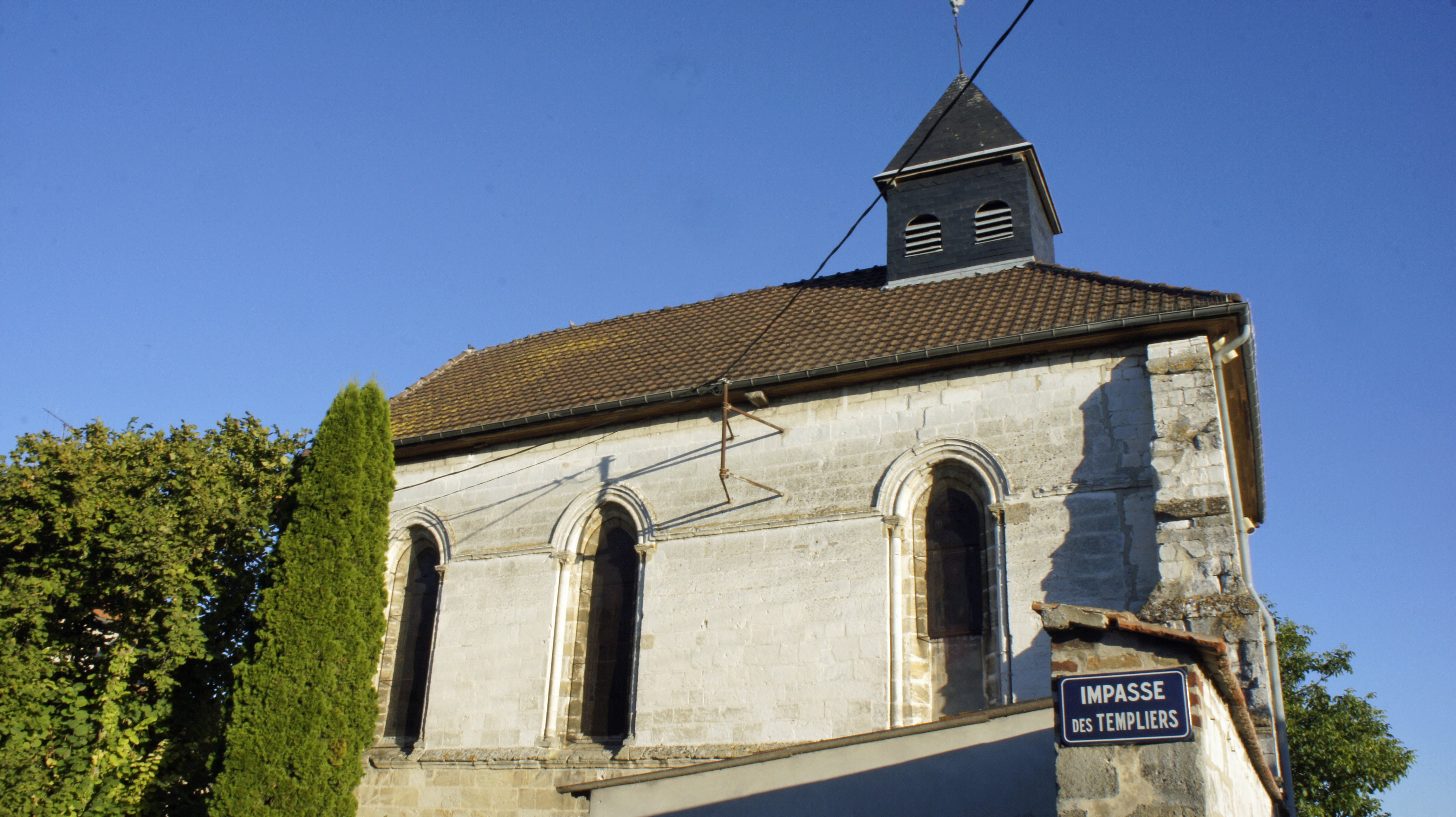 églsie templière et impasse menant à la demeure appartenant ua Temple.